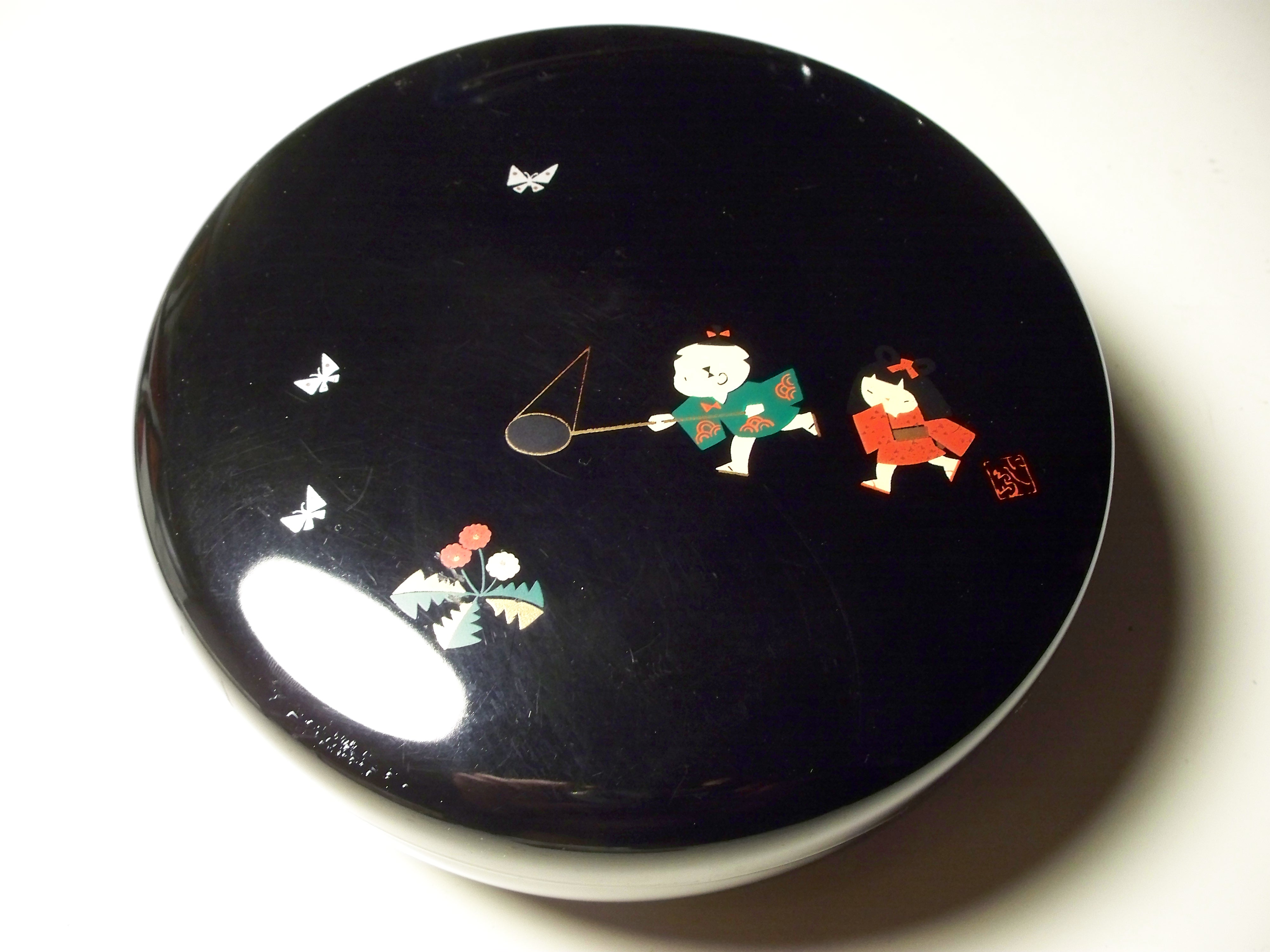 laka japonska wsp.